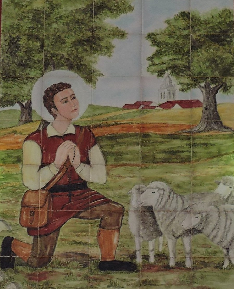 San Juan Macías, pastor de Tierra de Barros, peregrino de Nuestra Señora de la Coronada de Villafranca